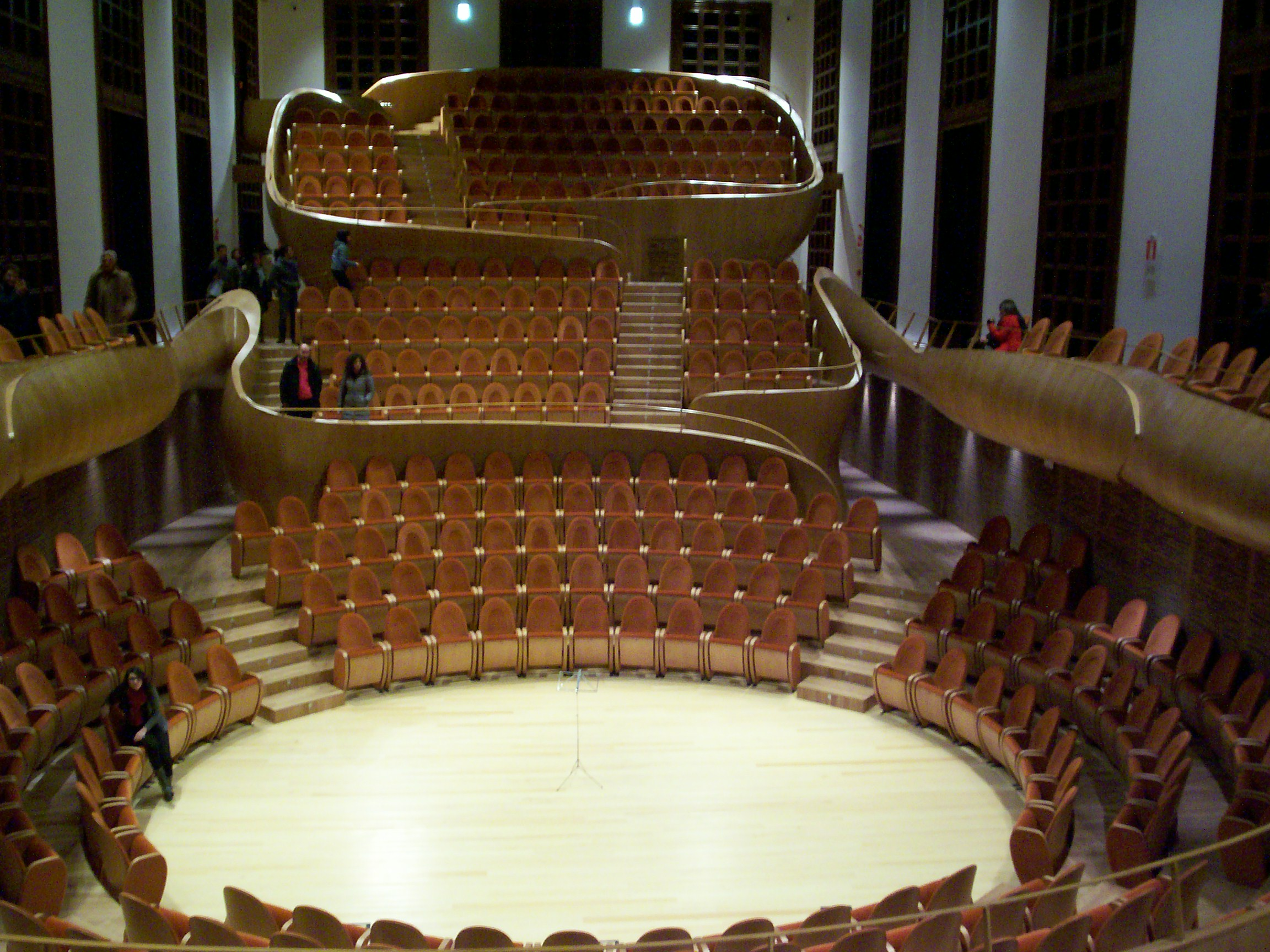 Palazzo dell'Arte - Museo del Violino This is a photo of a monument which is part of cultural heritage of Italy.